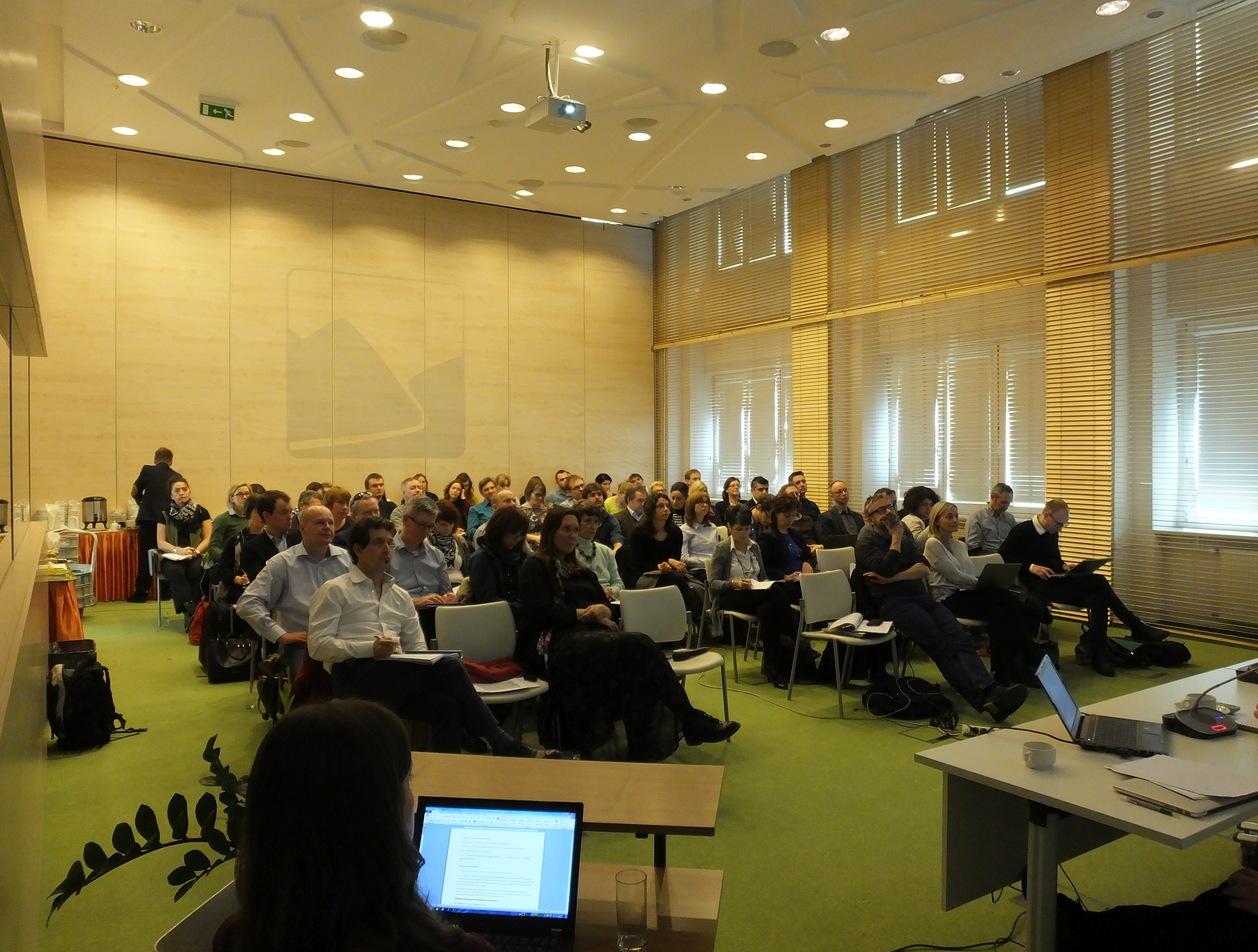 Sala konferencyjna (324B) Ministerstwa Środowiska w Warszawie. 31. spotkanie grupy roboczej Ecostat (WG Ecological Status) powołanej w ramach Wspólnej Strategii Wdrażania Ramowej Dyrektywy Wodnej. 16-17 marca 2016.